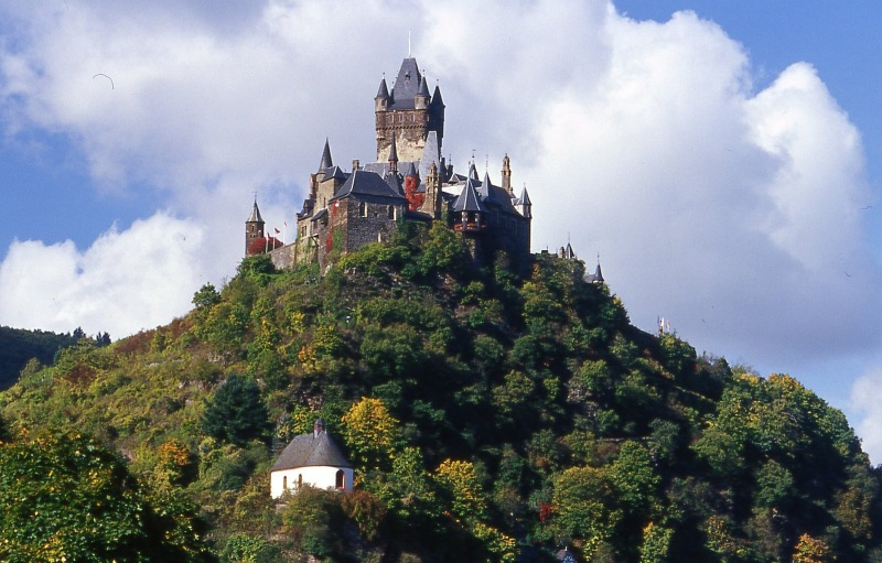 Original image description from the Deutsche Fotothek Rei´chsburg Cochem/Mosel